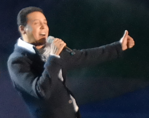 2013년 11월 3일 정읍 내장산 문화광장에서 열린 《MBC가요베스트》 녹화 현장에서 공연하는 박일준.